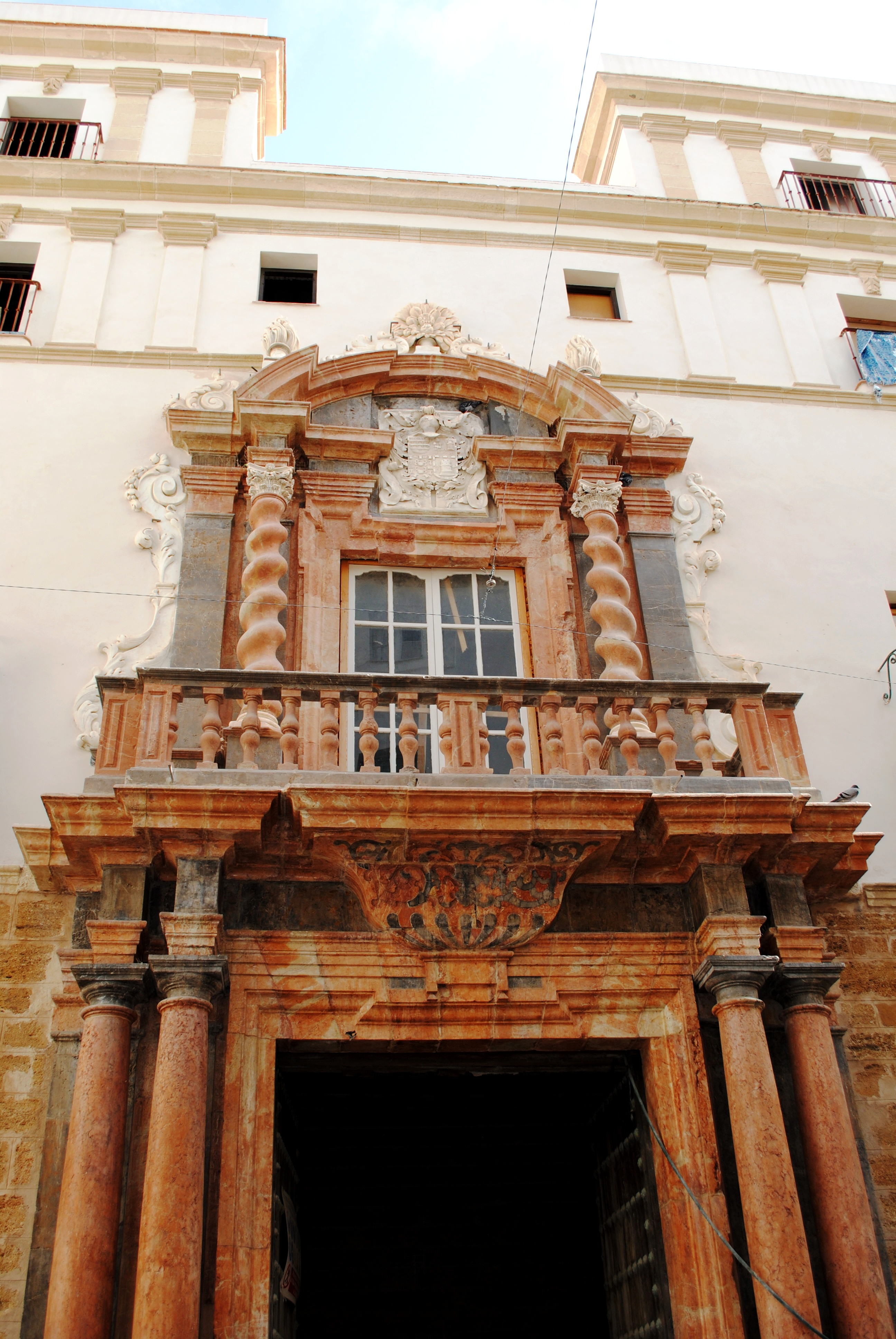 Casa del Almirante, Plaza de San Martín, Cádiz